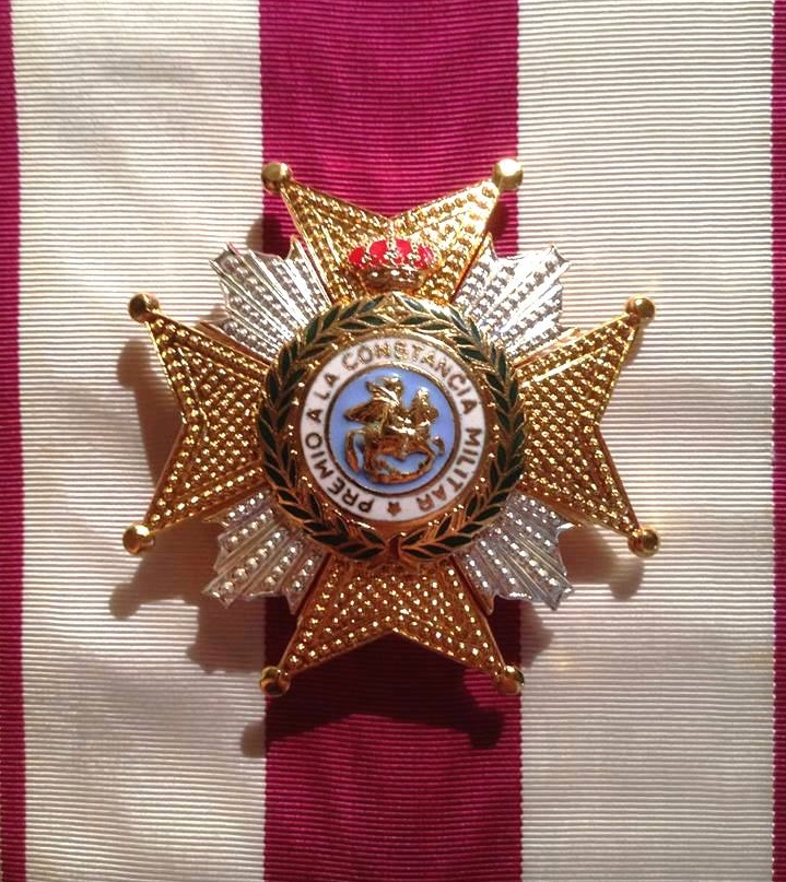 Placa y banda de Gran Cruz de la Orden de San Hermenegildo, Reino de España. Las insignias de la imagen pertenecen a mi colección.